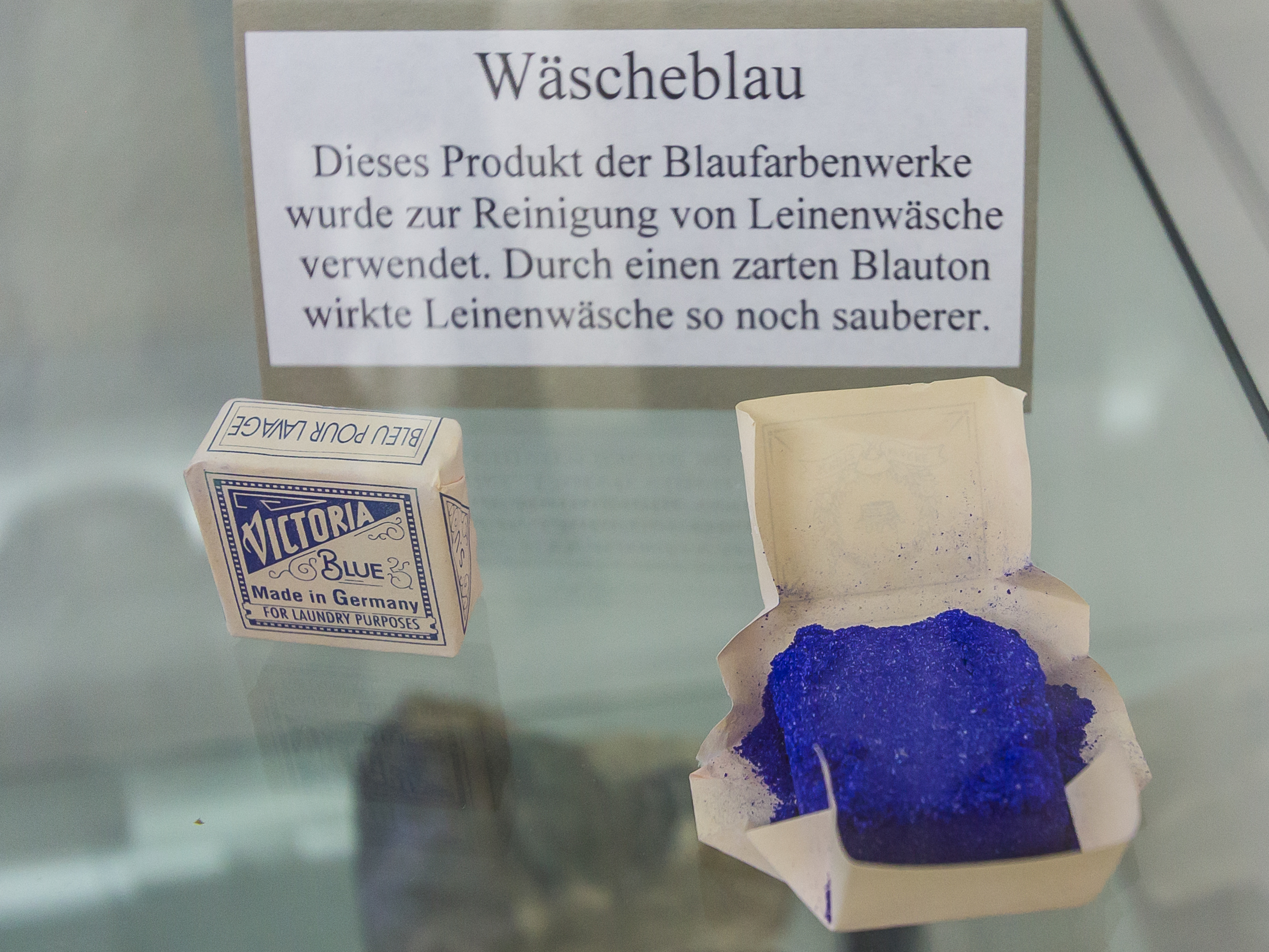 Museum Uranbergbau - Wäscheblau